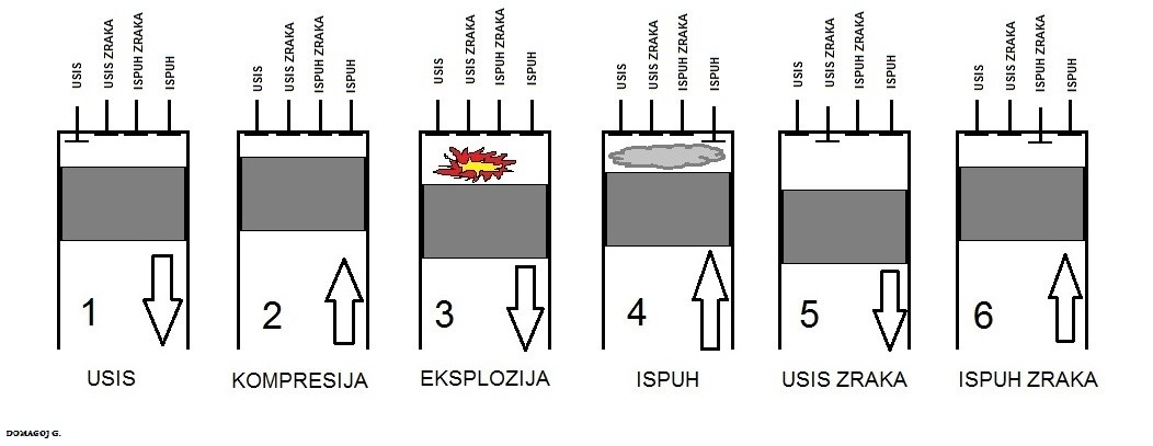 ŠESTEROTAKTNI MOTOR SA ZRAKOM KAO MEDIJEM